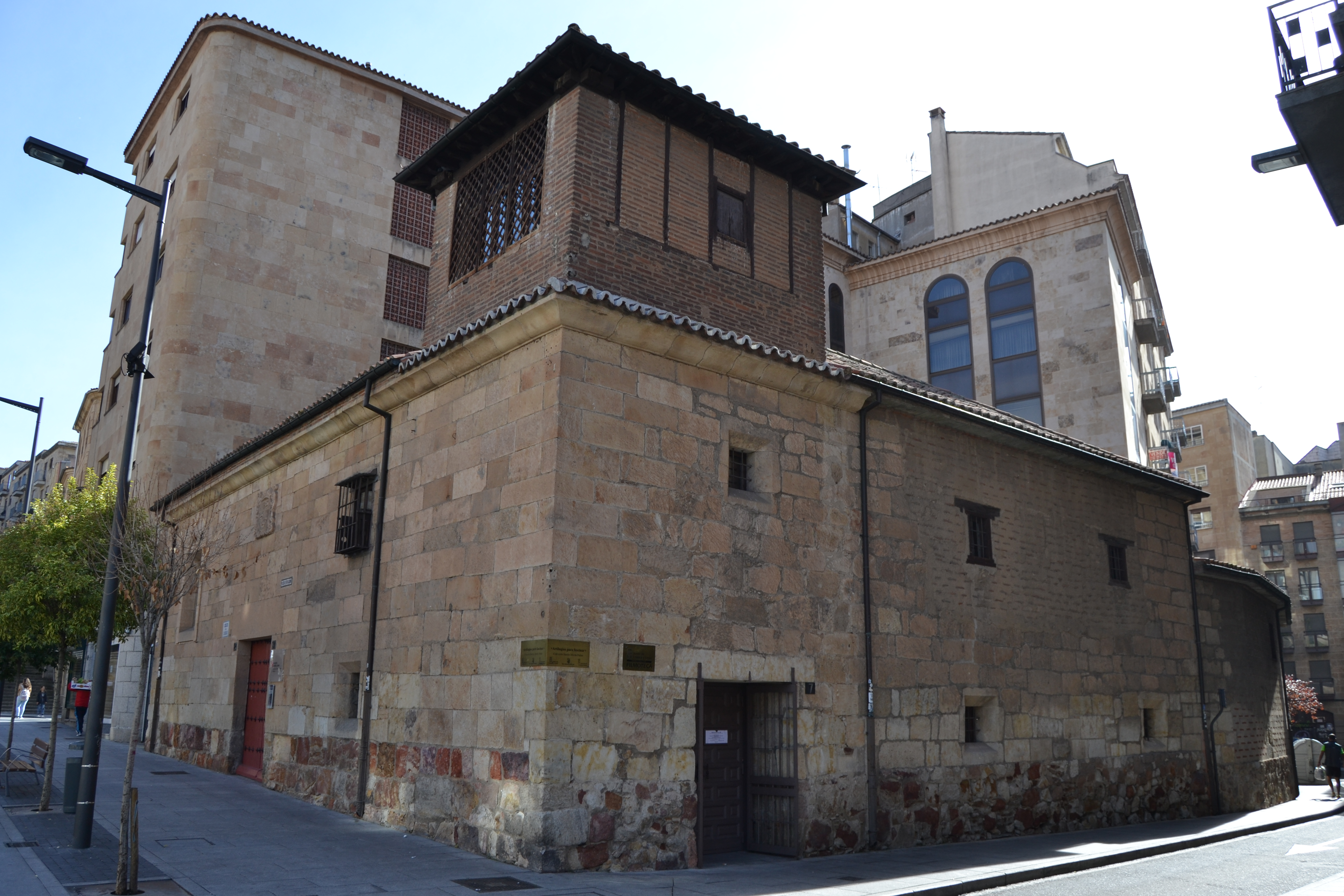 Salamanca, Castilla y León, España. Octubre de 2016.